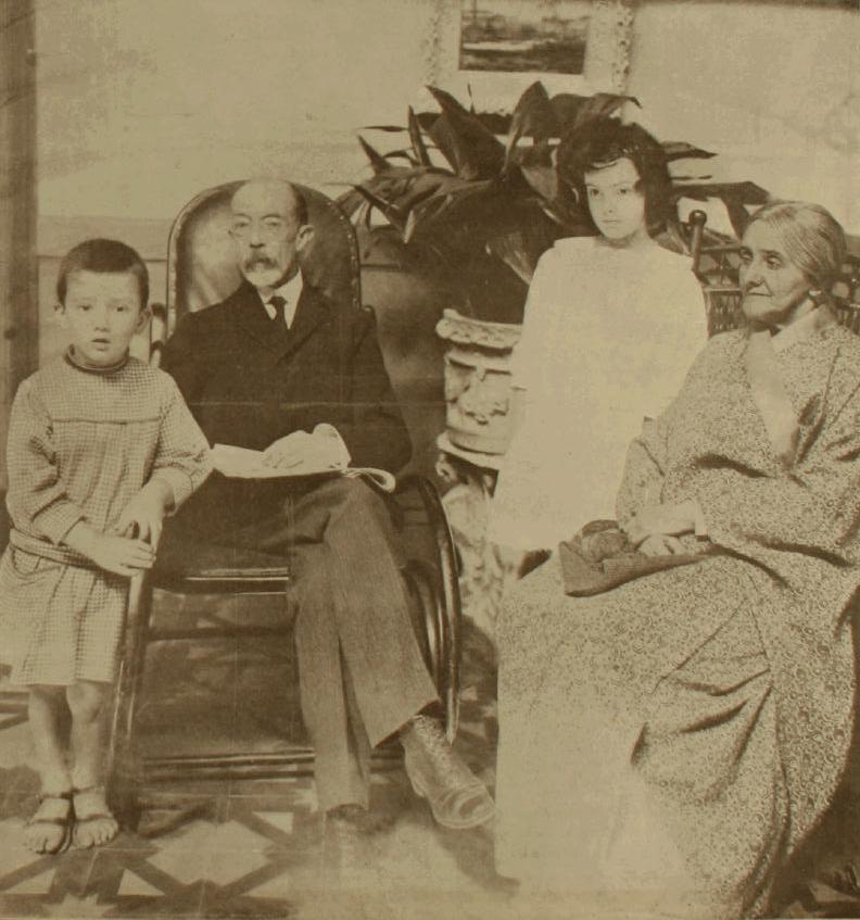 El señor Alcalde, don Ismael Valdés Vergara, en la intimidad de su hogar.